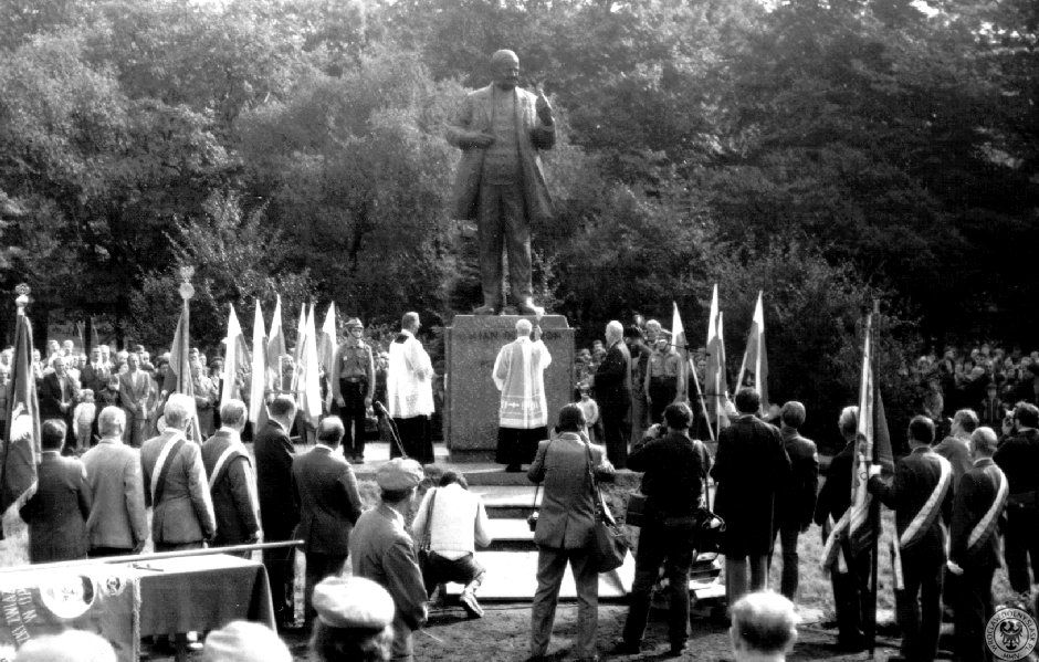 Odsłonięcie pomnika Jana Dzierżona